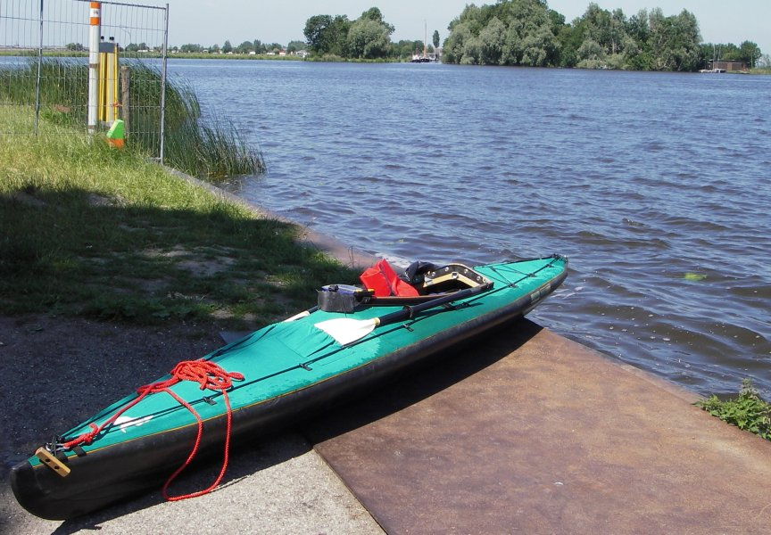 Klepper Aerius I vouwkano op de oever van de Wijde Aa bij Hoogmade, eigen foto Caseman, juni 2006